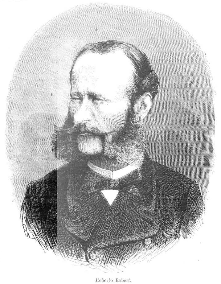 Roberto Robert, en la revista española La Ilustración Española y Americana.